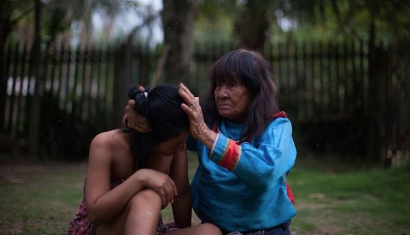 Olivia Arévalo en la amazonía de Perú el 2018. Foto por Swiatoslaw Wojtkowiak